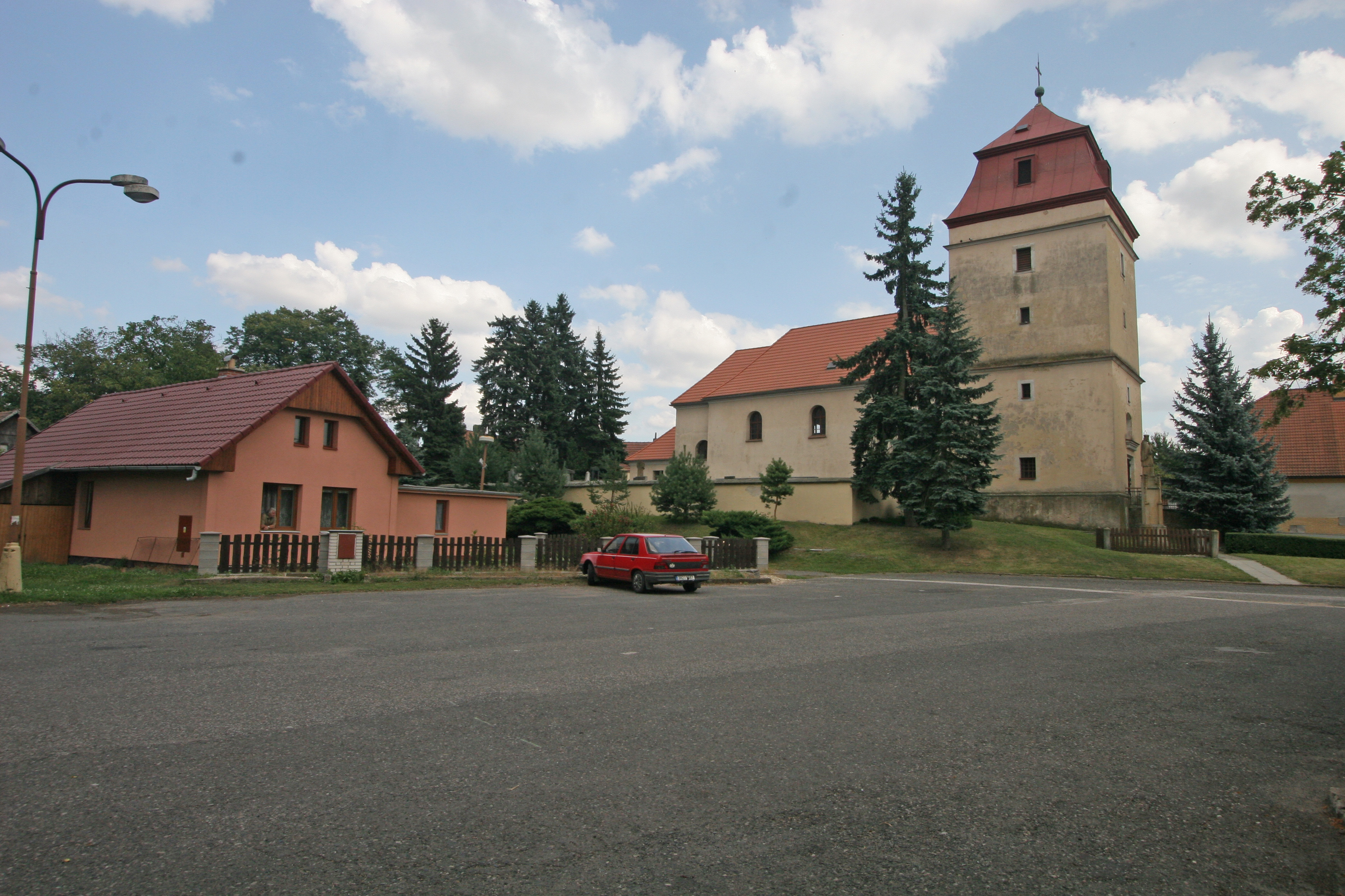 Libřice Kostel svatého Michaela archanděla